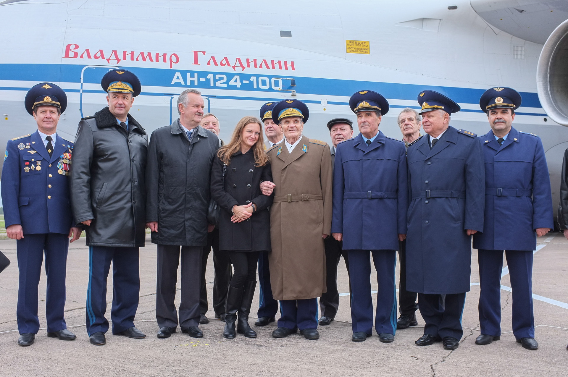 Владимир_Гладилин_самолет